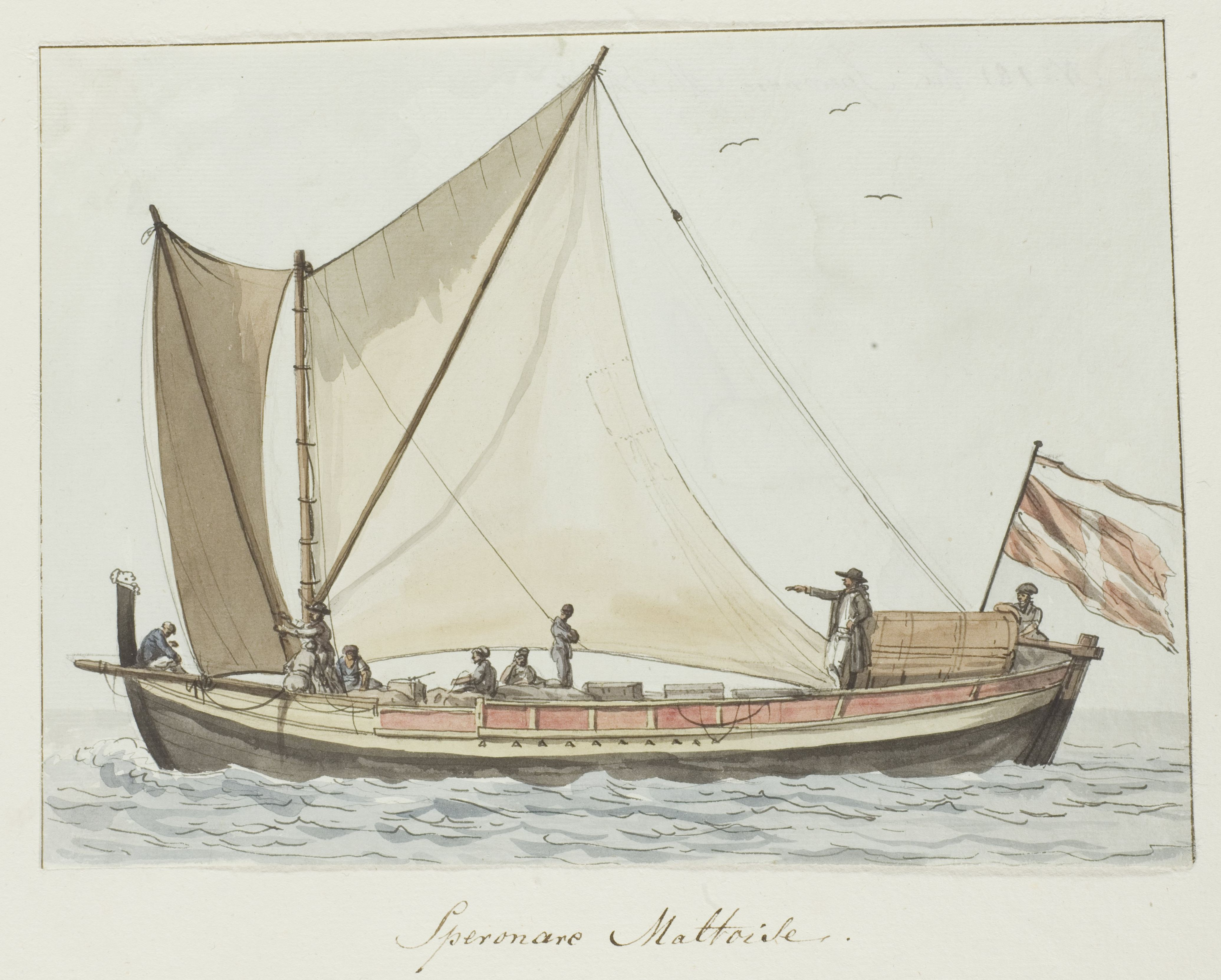 IdentificatieTitel(s): Speronare schip afkomstig uit MaltaSpéronare Maltoise (titel op object)Voyage en Italie, en Sicile et à Malte - 1778 (serietitel)Objecttype: tekening aquarel Objectnummer: RP-T-00-493-66BCatalogusreferentie: Niemeijer&De Booy 224Opschriften / Merken: opschrift, verso, handgeschreven: ‘No 181 bis Spéronare Maltoise’Omschrijving: Tekening uit het album 'Voyage en Italie, en Sicile et à Malte', 1778.VervaardigingVervaardiger: tekenaar: Louis DucrosDatering: 1778Fysieke kenmerken: zwart krijt, aquarel, pen in zwartMateriaal: papier krijt waterverf Techniek: penseel / penAfmetingen: blad: h 165 mm × b 227 mmVerwerving en rechtenCredit line: Schenking van mevrouw Hansen-van den Brugghen, Den HaagVerwerving: schenking 1948Copyright: Publiek domein